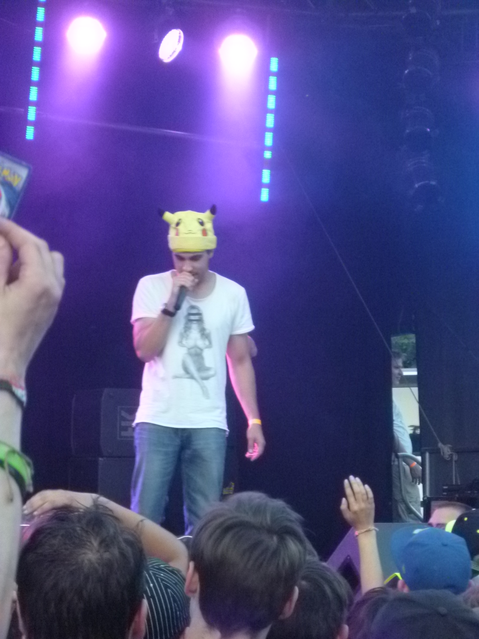 Sudden auf dem Rockem Festival 2013 in Neunkirchen (Saar)